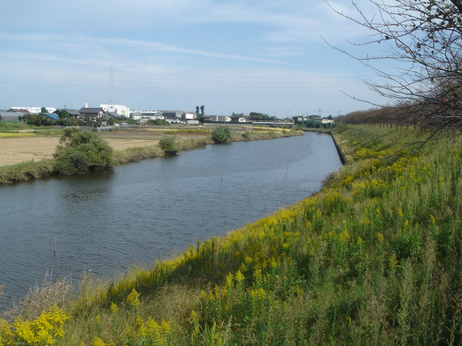 大榑川、岐阜県海津市平田町。